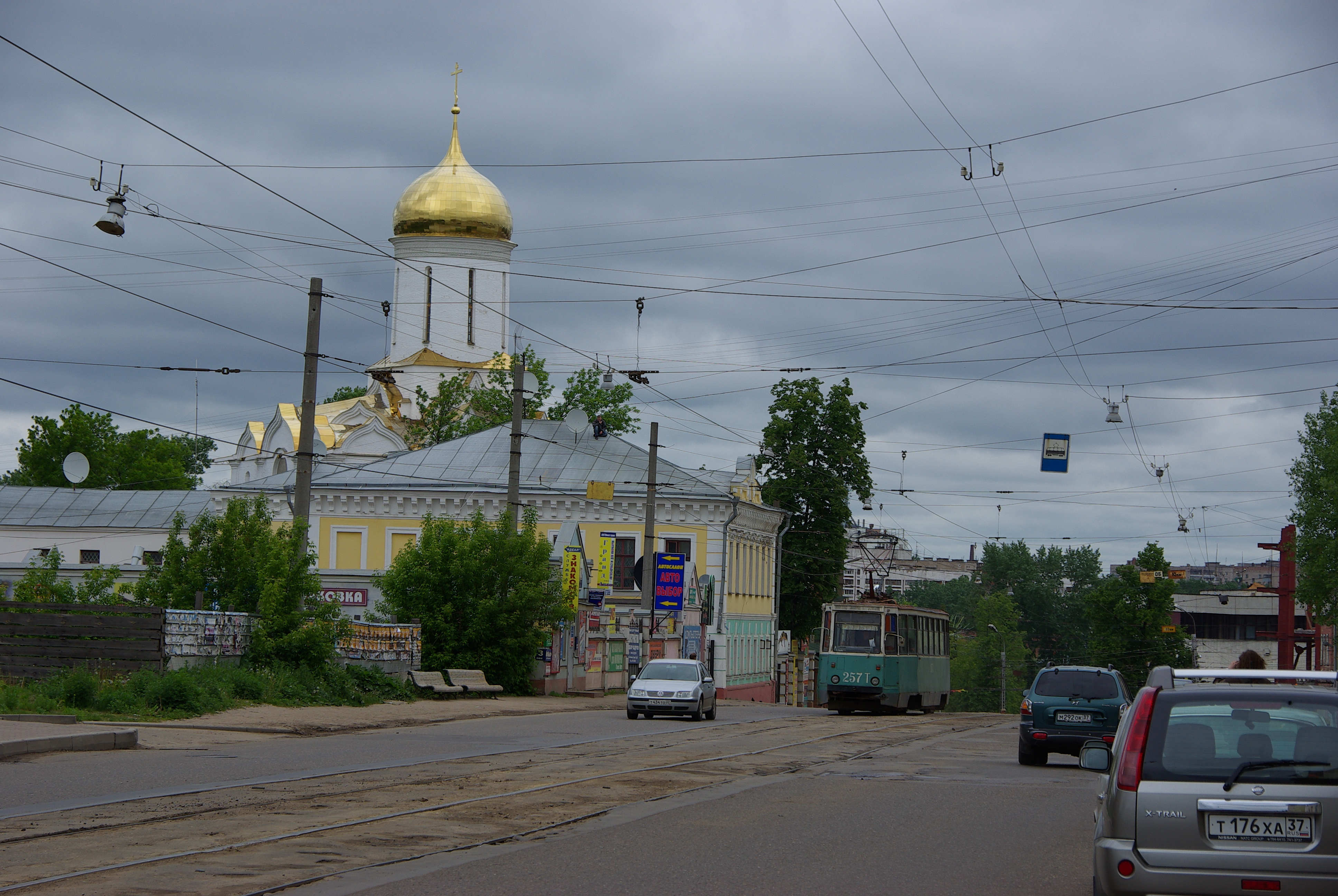 Frunzenskiy r-n, Ivanovo, Ivanovskaya oblast', Russia